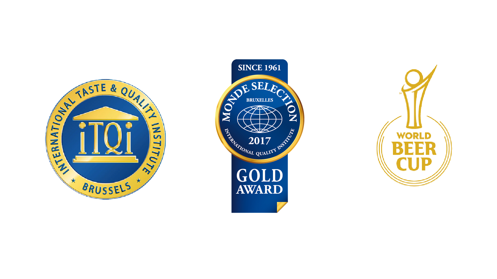 Premios obtenidos